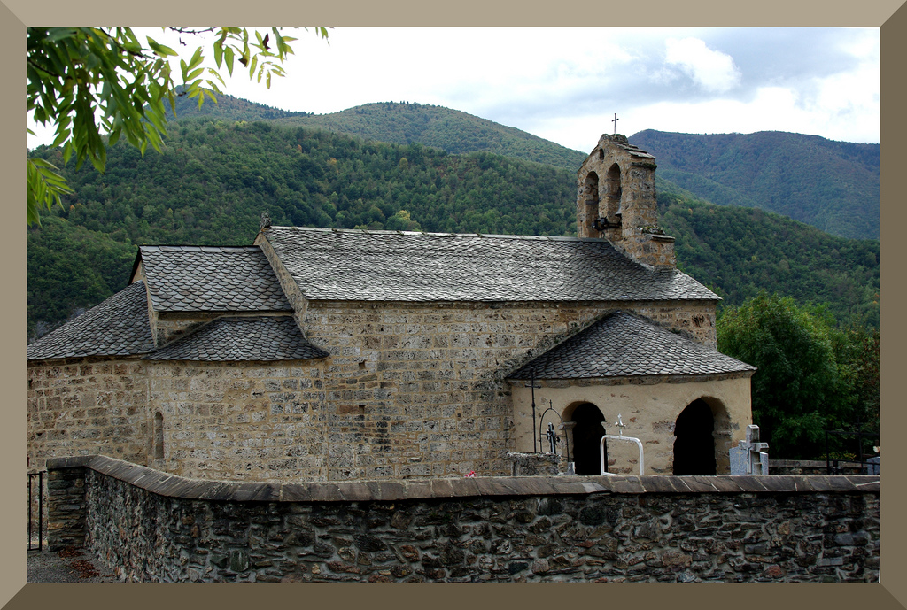 Église Sainte-Marthe de Vernaux .